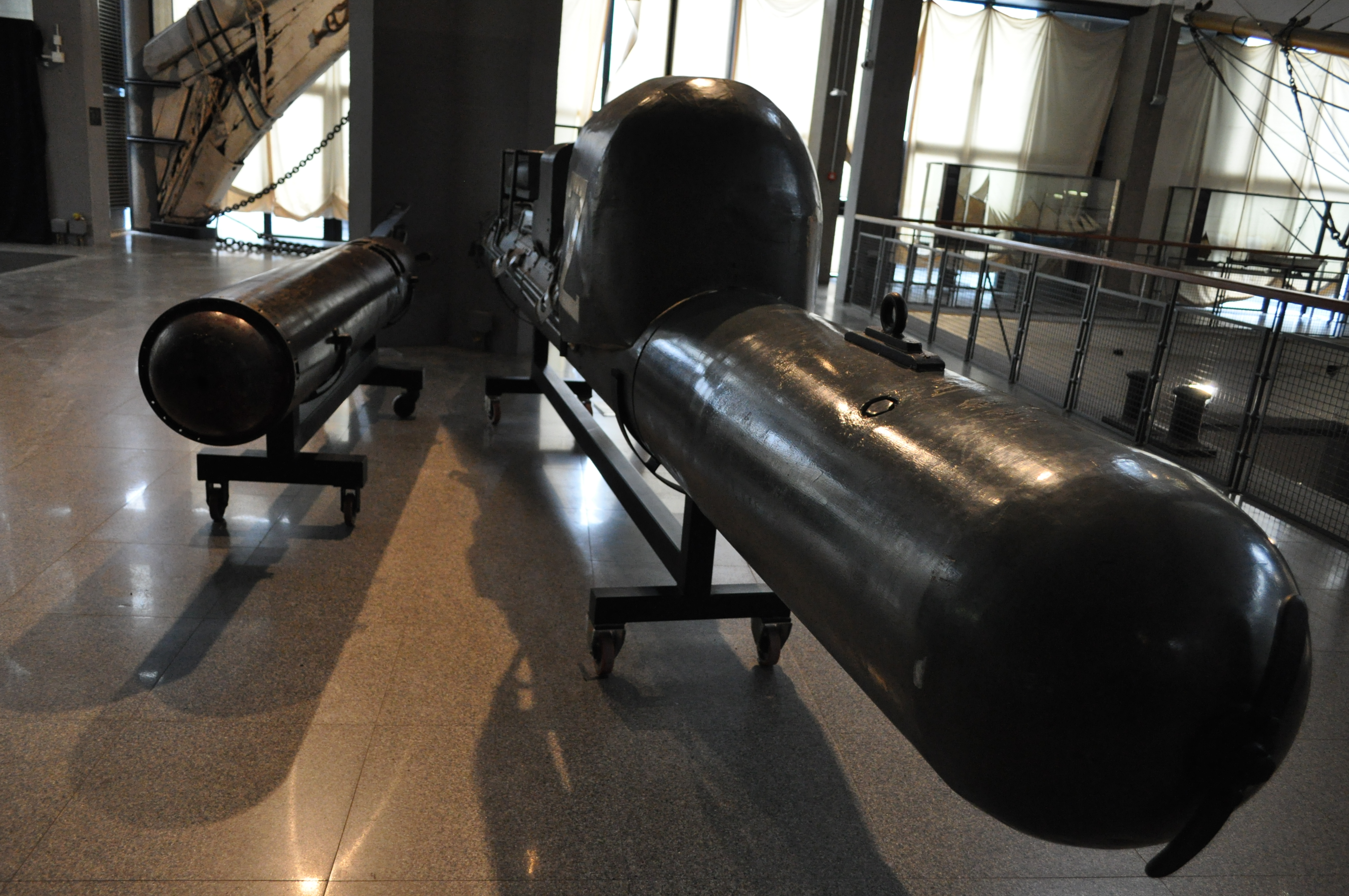 Esemplare di Siluro a Lenta Corsa conservato al Museo della scienza e della tecnica di Milano